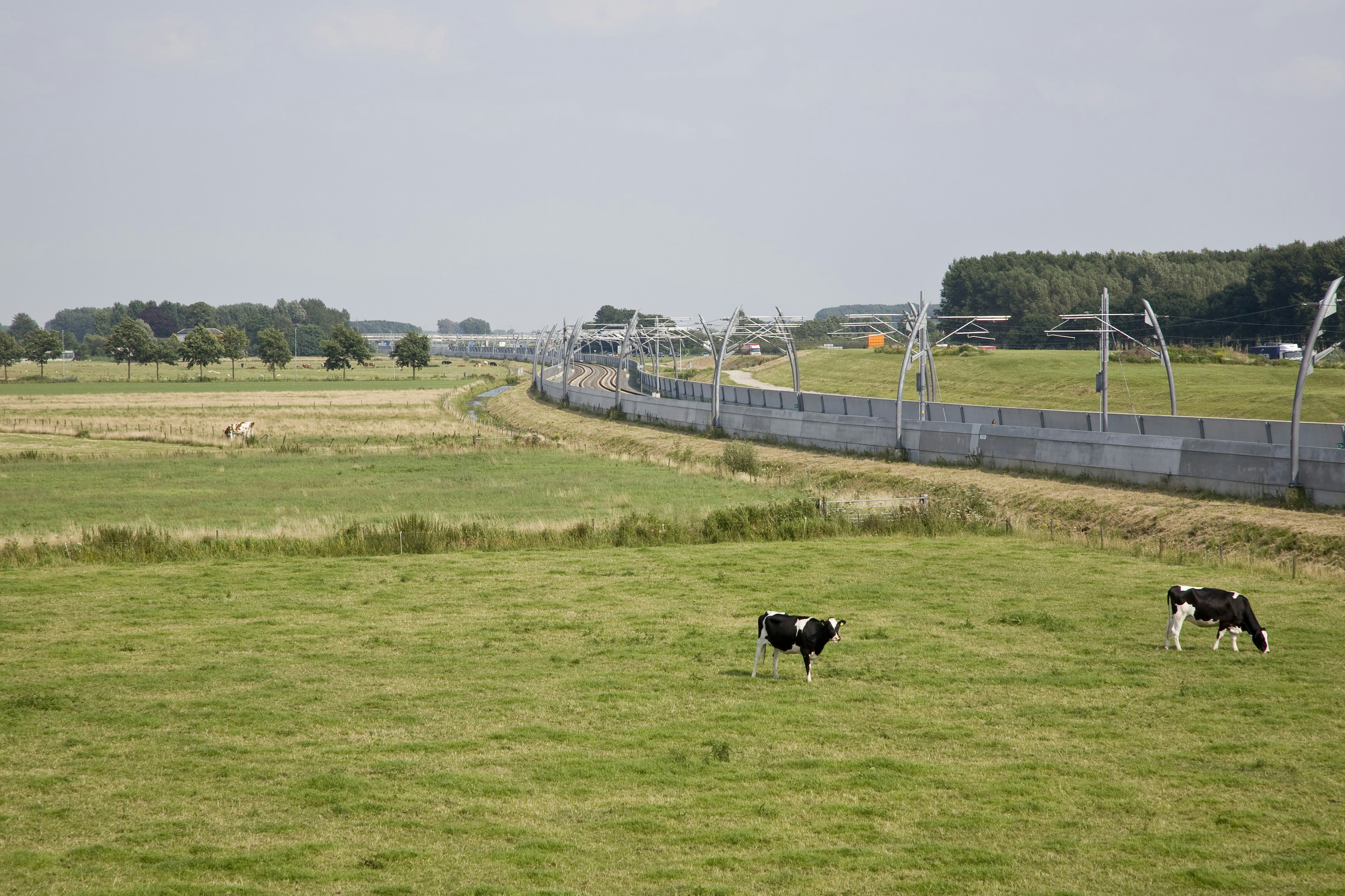 Betuwelijn: Ligging van de Betuwelijn in het landschap nabij Dodewaard (opmerking: Betuwelijn tussen knooppunt Deil en Dodewaard)